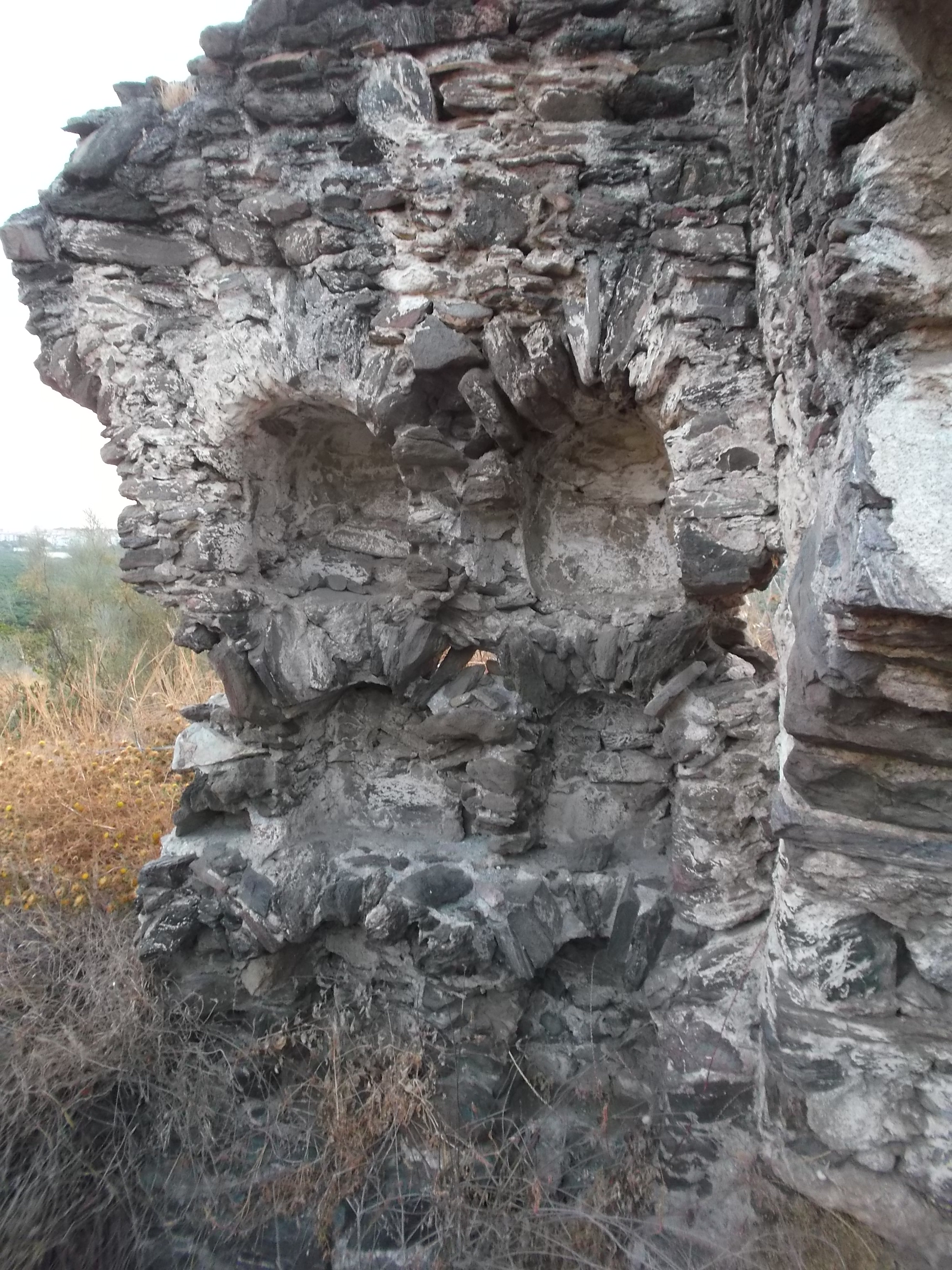 Nichos del columbario romano Antonino Rufo o La Albina.